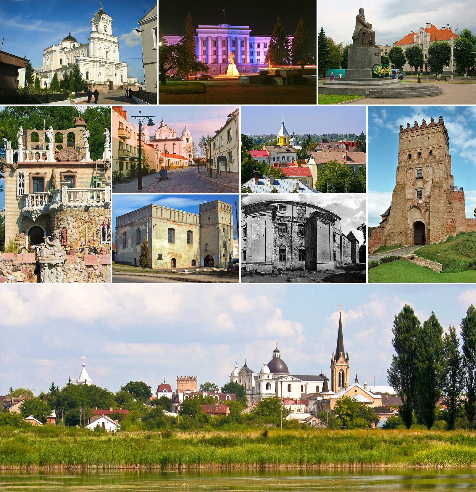 Lutsk